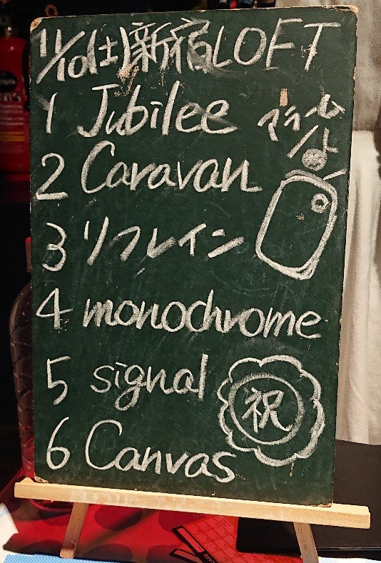 amiinAセトリボード(20181110(1))